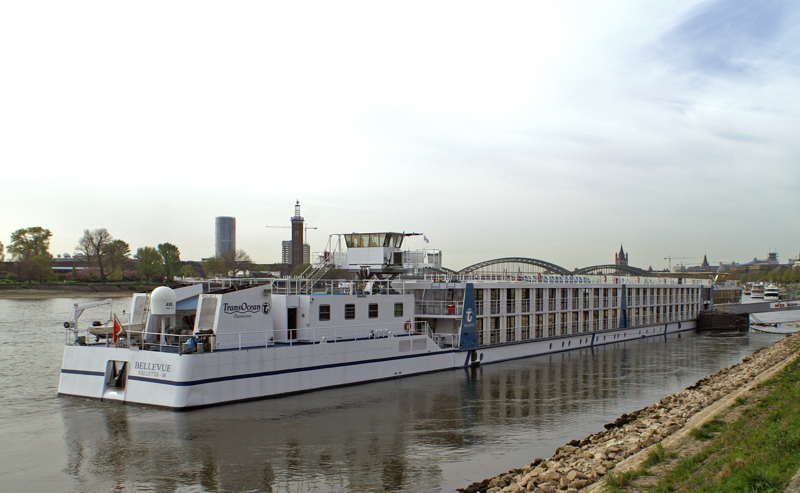 Flusskreuzfahrtschiff Bellevue am Anleger Köln.